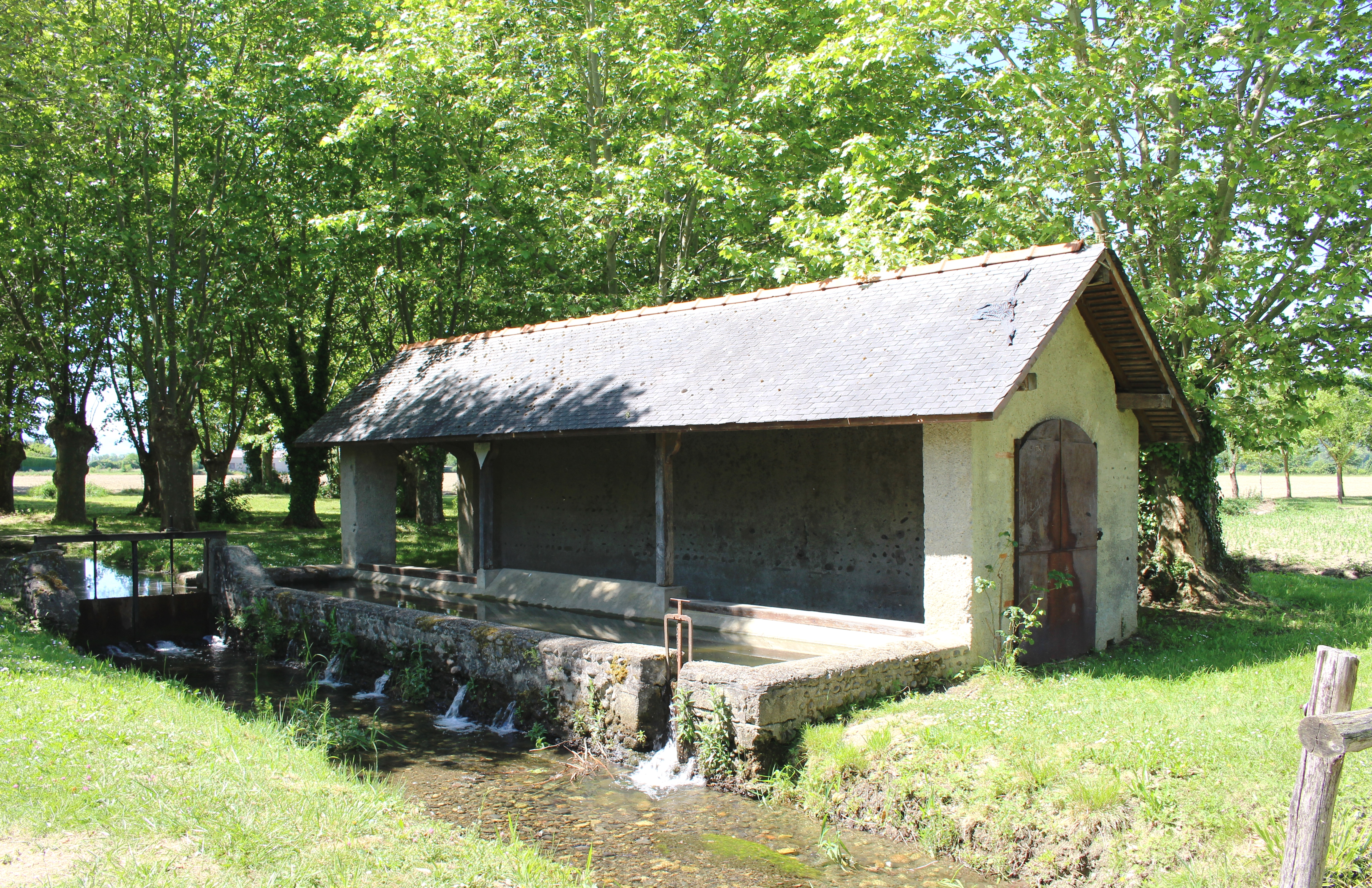 Lavoir de Pujo (Hautes-Pyrénées)